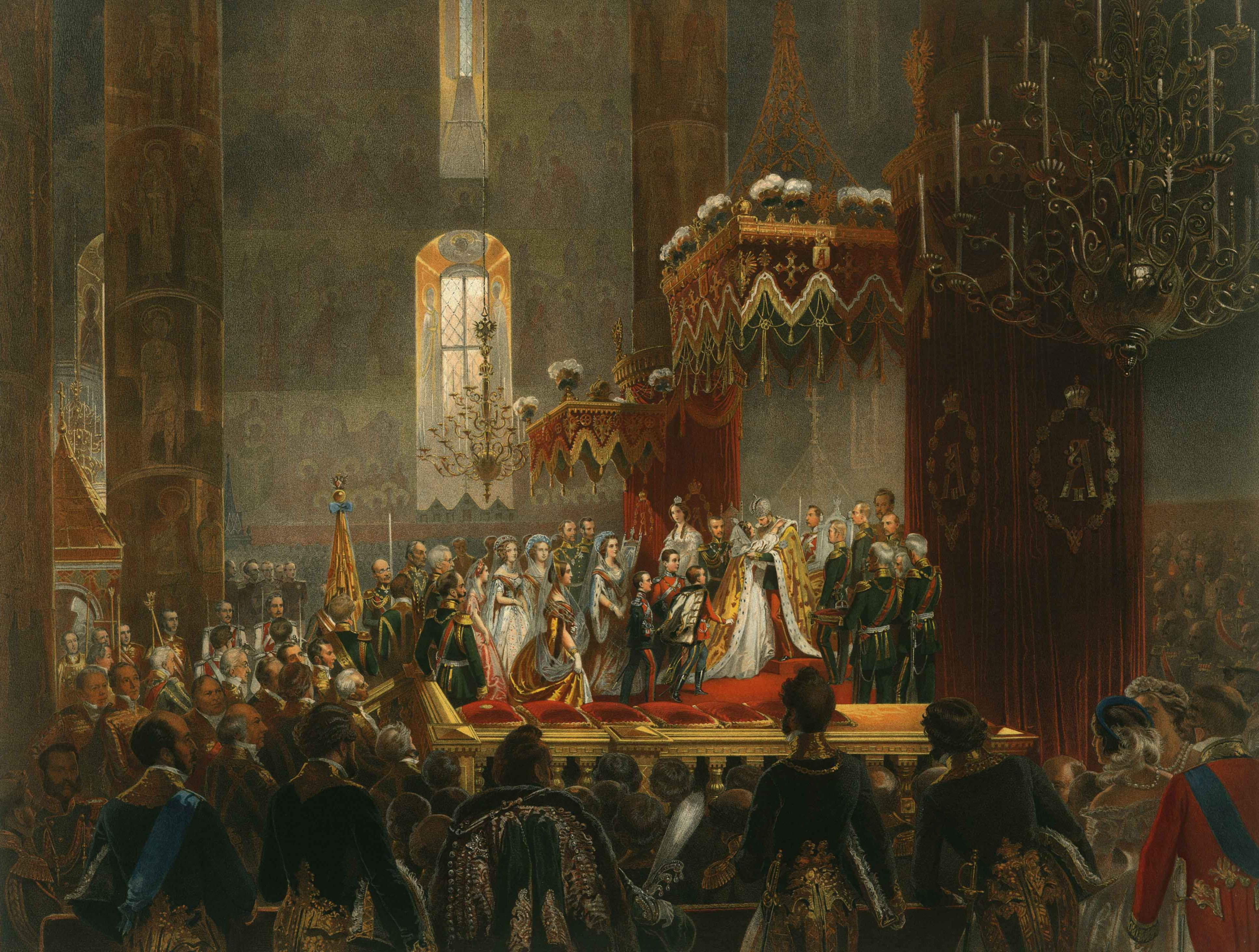 Homage from the imperial Family to Alexander II. / Beglückwünschung Alexander II von den Mitgliedern der Kaiserlichen Familie (Chromolithographie)